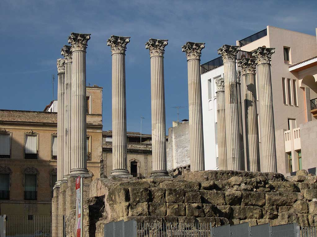 Restos del templo romano de Córdoba (España). Calle Claudio Marcelo, esquina Capitulares.